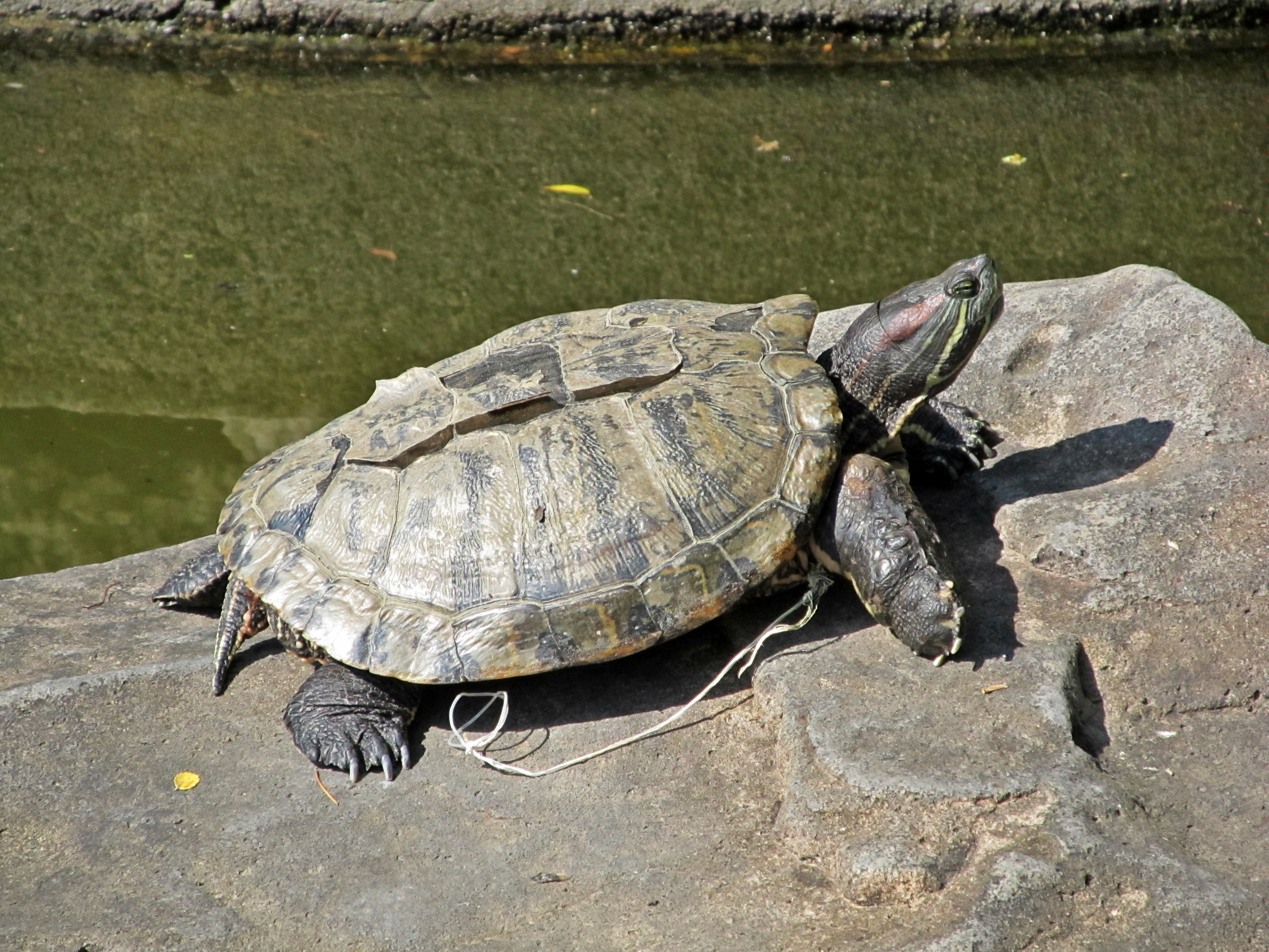 岩の上で甲羅干しする亀。（金星台、諏訪山公園、兵庫県神戸市中央区諏訪山町1丁目） Kinseidai (Chūō-ku, Kobe, Hyogo,Japan)